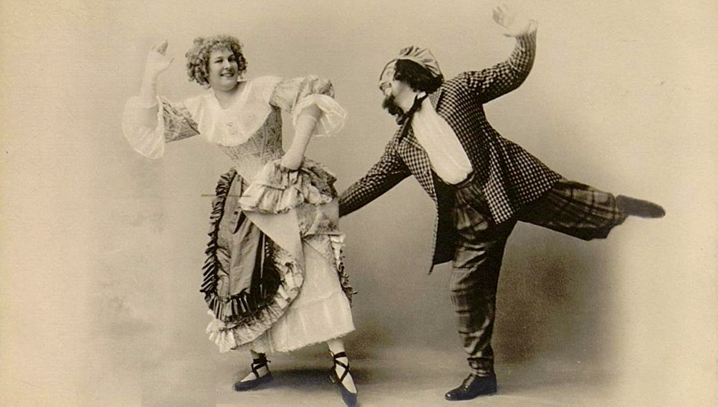 Русский танцовщик Сергей Легат и балерина Мария Петипа в балете Ц. Пуни «Наяда и рыбак»